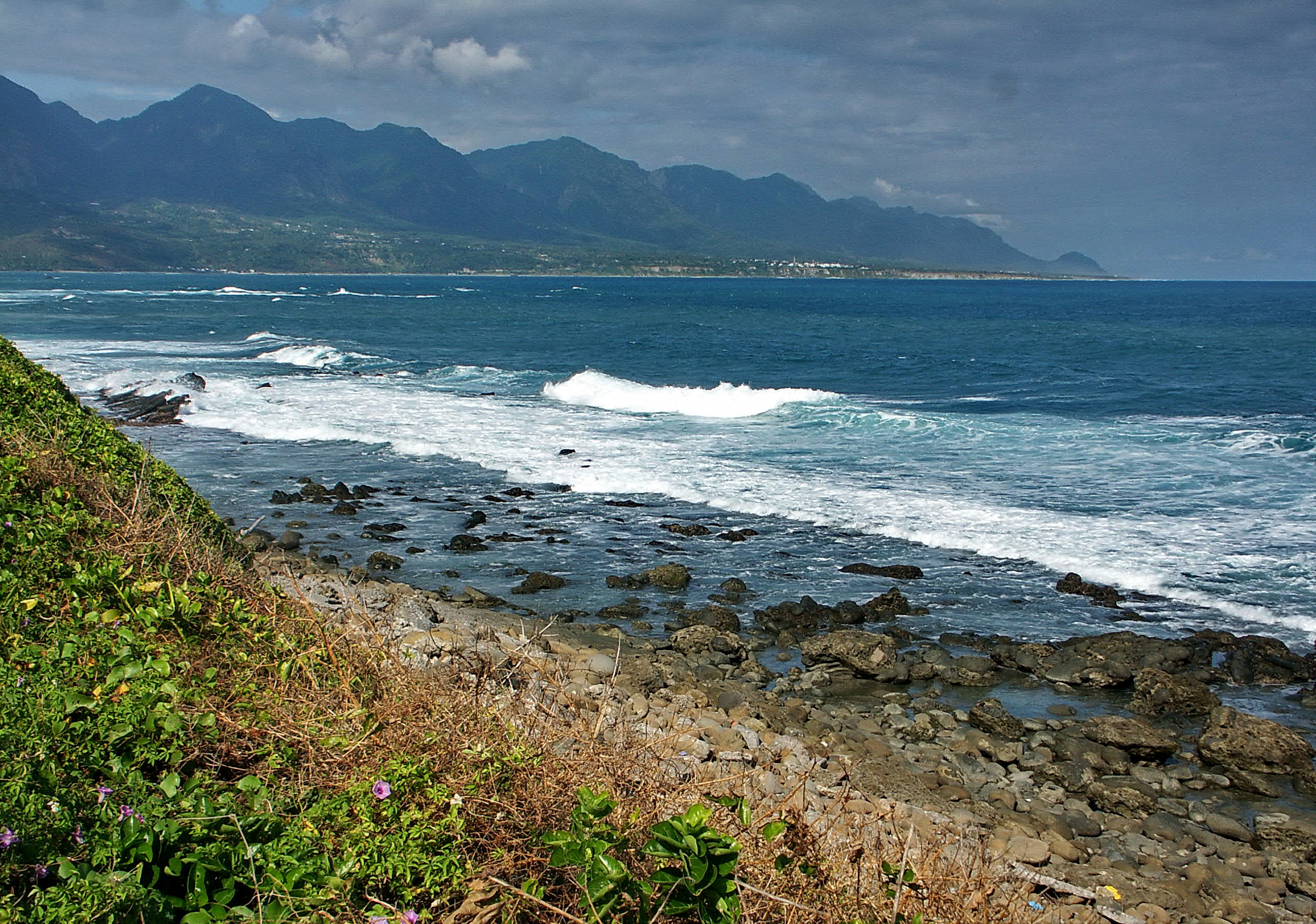 加路蘭海岸 Kararuan Coast